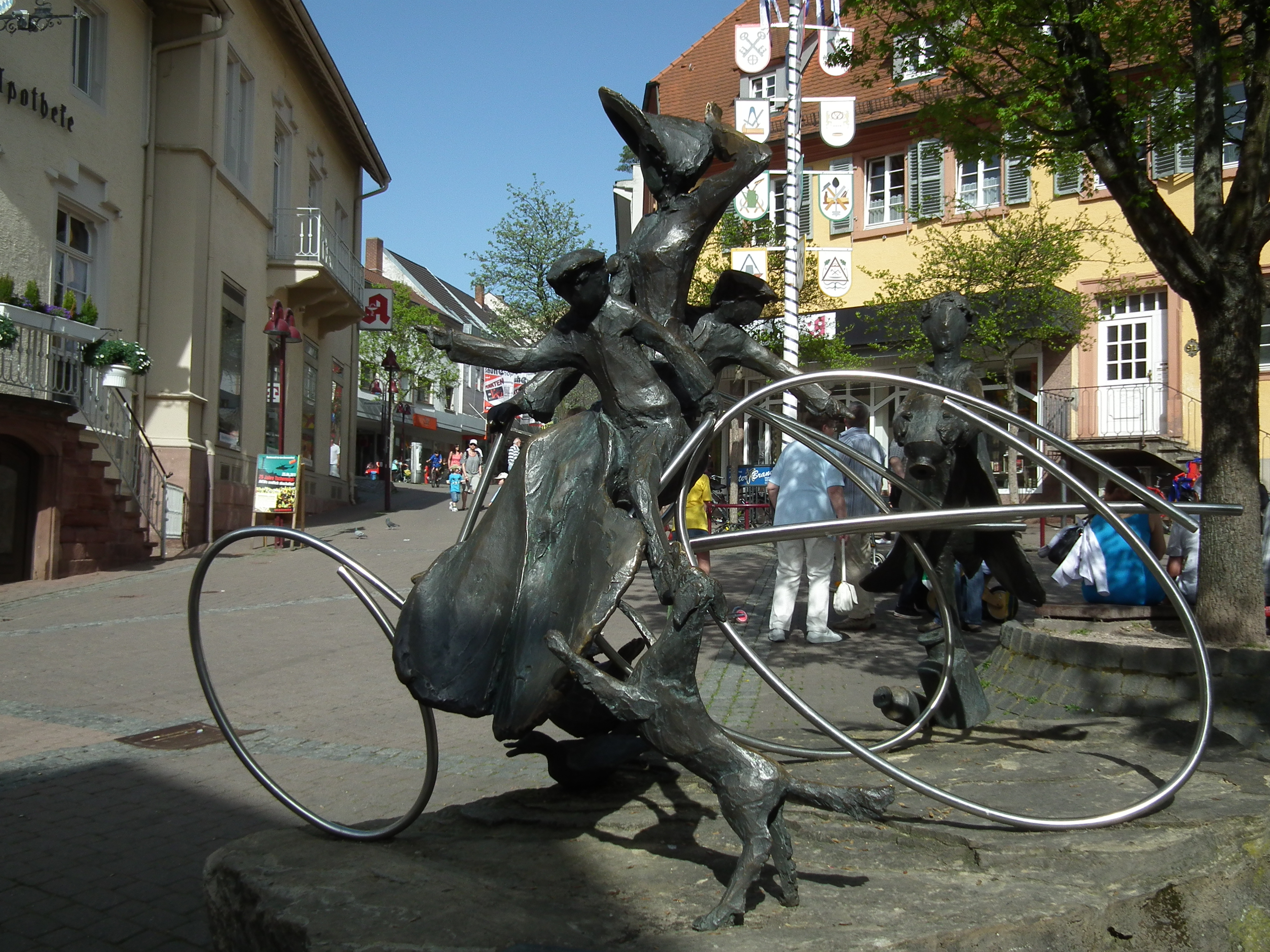 Skulptur "Bertha Benz" (1991) aus Bronze mit Edelstahl auf Kalksteinsockel von Pit Elsasser, aufgestellt in der Oberen Hauptstraße gegenüber der historischen Stadtapotheke in Wiesloch (Baden-Württemberg, Deutschland)